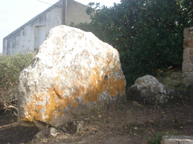 Dolmen de Runaron